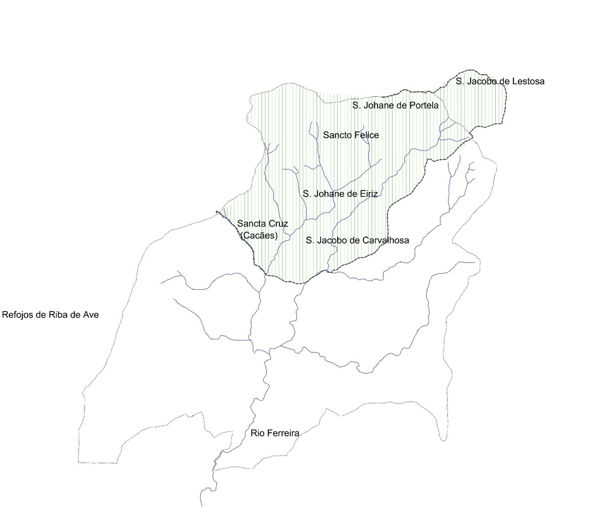 Foral da Terra de Ferreira, D. 1514, setembro, 15 – D. Manuel outorga o foral à terra de Ferreira. "Foral da terra de Ferreira do julgado d’ Aguiar de Sousa termo do Porto dado por sentenças del Rey dom Afomsso meu tio."